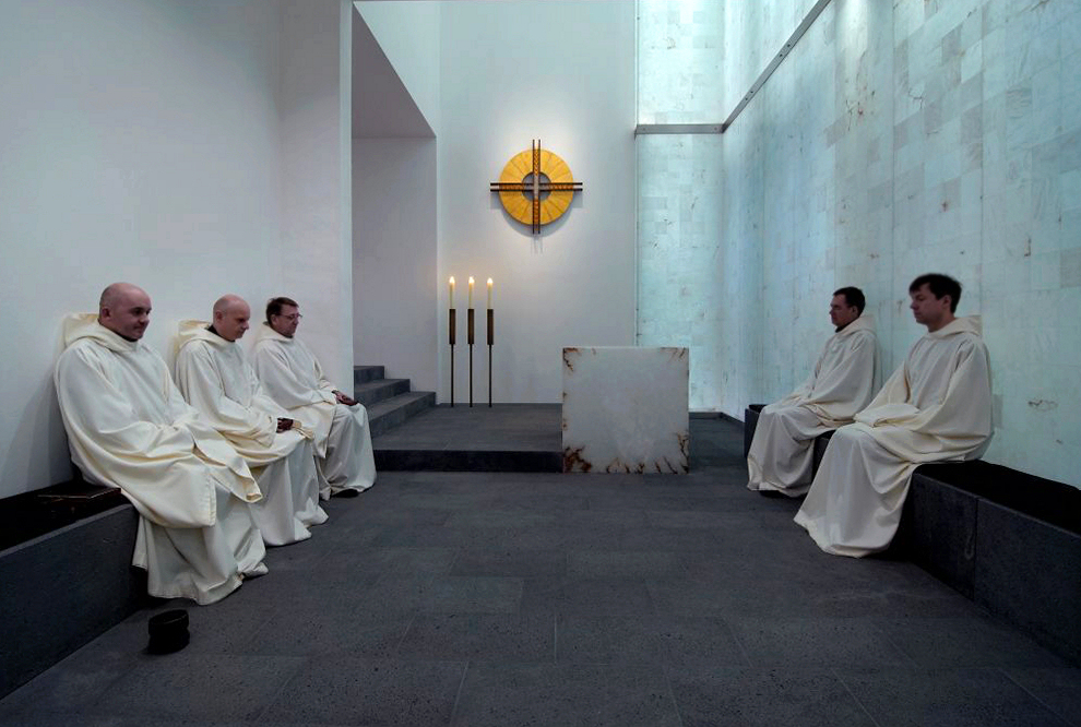 Blick in die Hauskirche